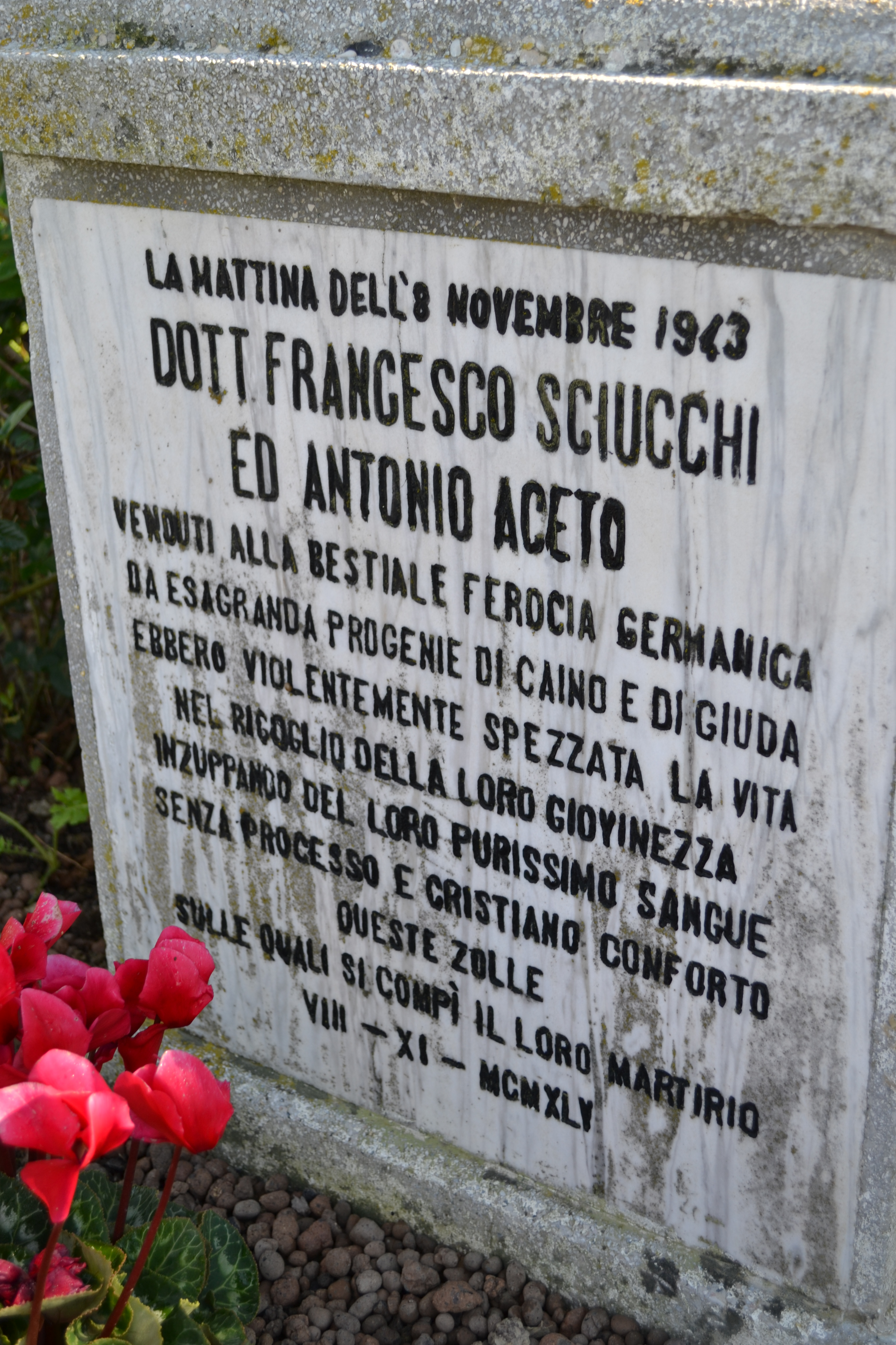 Stele posta sul posto dove vennero uccisi l'otto novembre 1943 dai nazisti Francesco Sciucchi e Antonio Aceto (Bucchianico, SS81 Km 150)